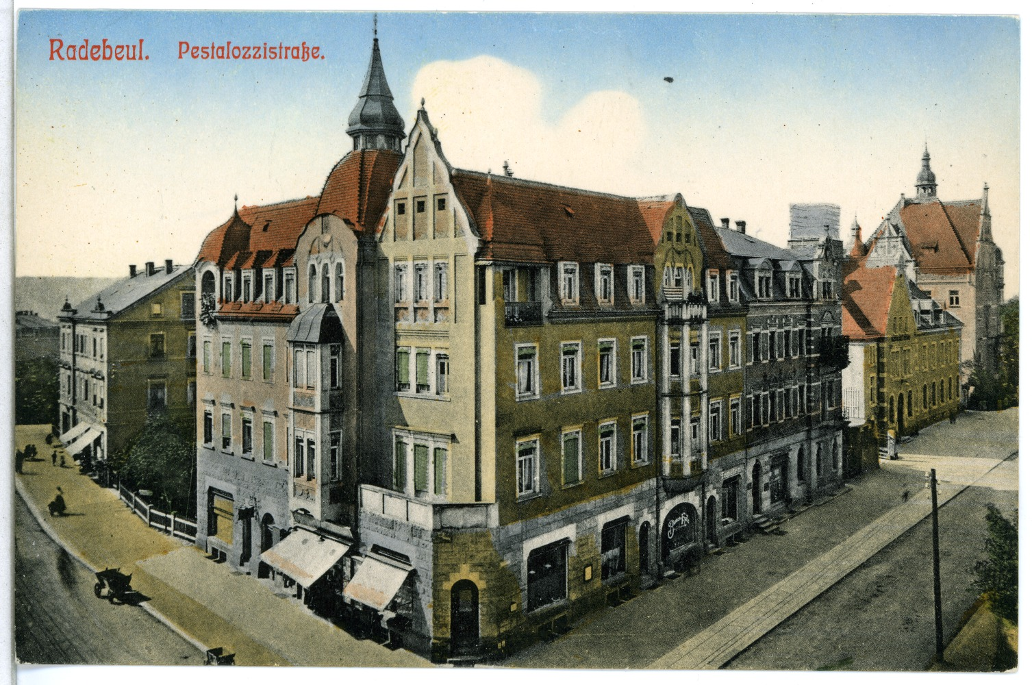 Radebeul; Pestalozzistraße This postcard is from publisher Brück & Sohn in Meißen ( postcard has a unique number 12705 and is available in a higher resolution at the publisher. This images was uploaded in a cooperation project between Wikipedians and the publisher.